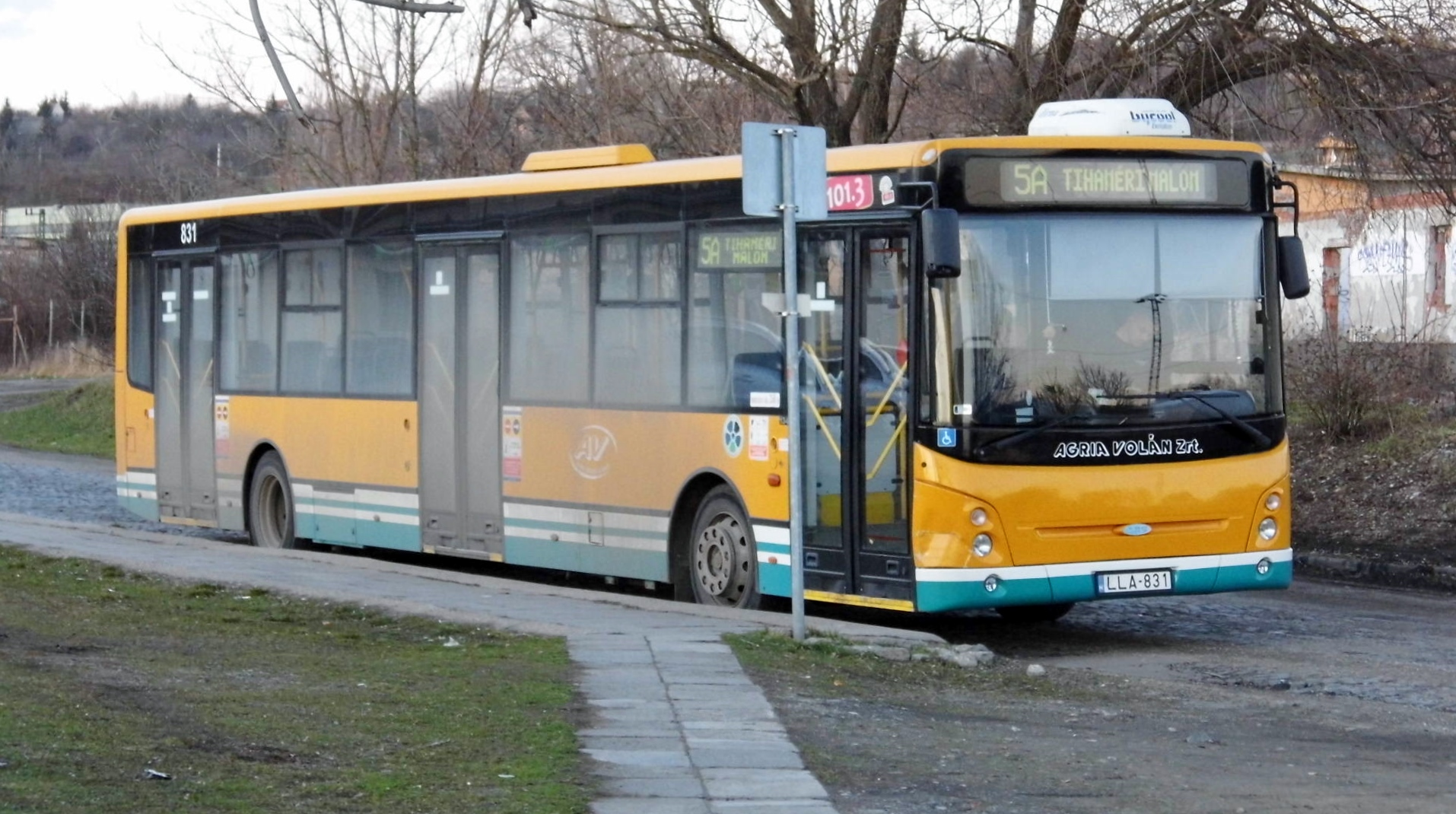 5A busz Tihamér vasútállomásnál Egerben